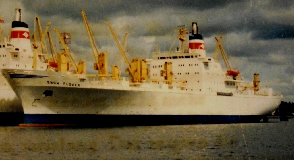 Aufliegende Snow-Schiffe, Snow Flower IMO Number: 7114953 MMSI Number: 518167000 Callsign: ZKU2118 Length: 173 m Beam: 18 m